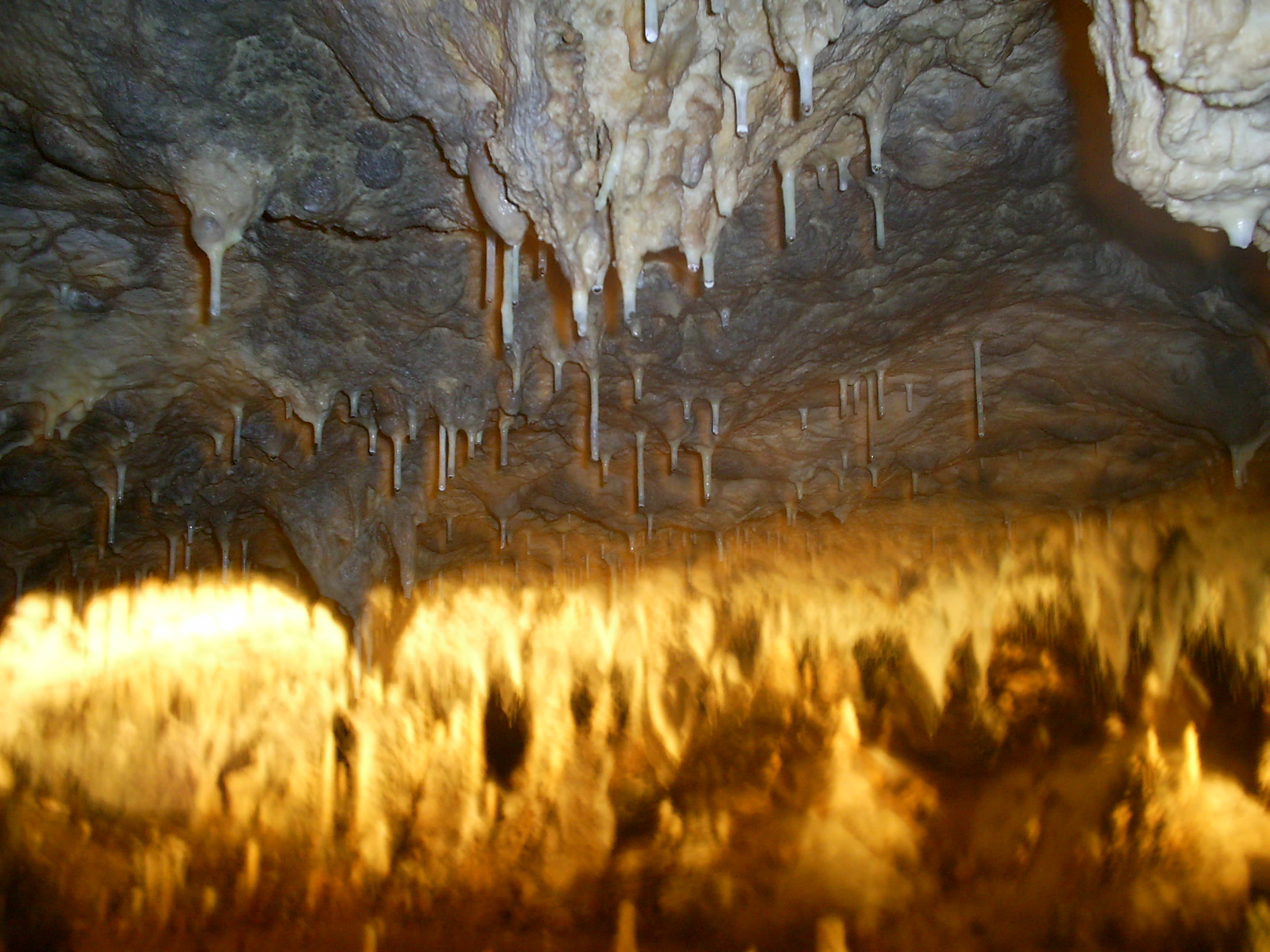 Snejanka Cave, Bulgaria